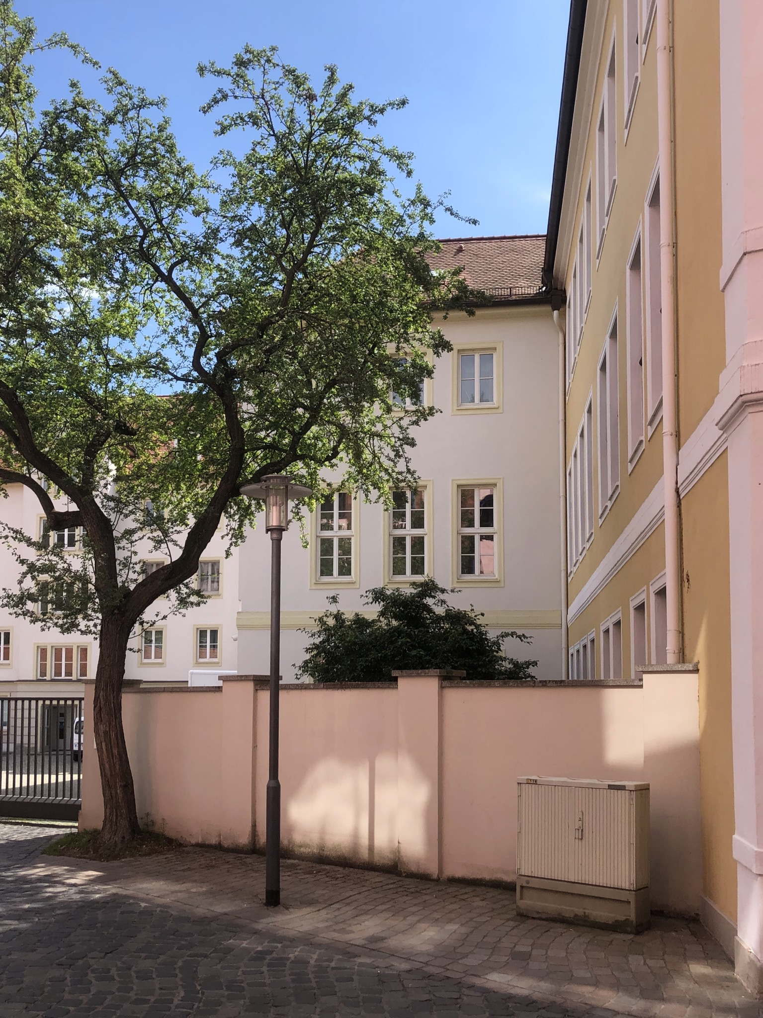 Nordseite des Südflügels des Landtags von Sachsen-Anhalt ehemalig Kreuzgangstraße 5